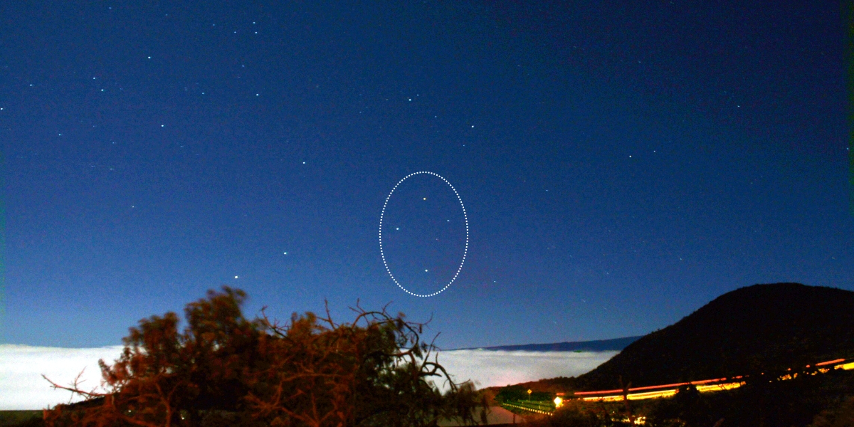 Южный крест. Иллюcтрация для викиуебника Гавайеведение